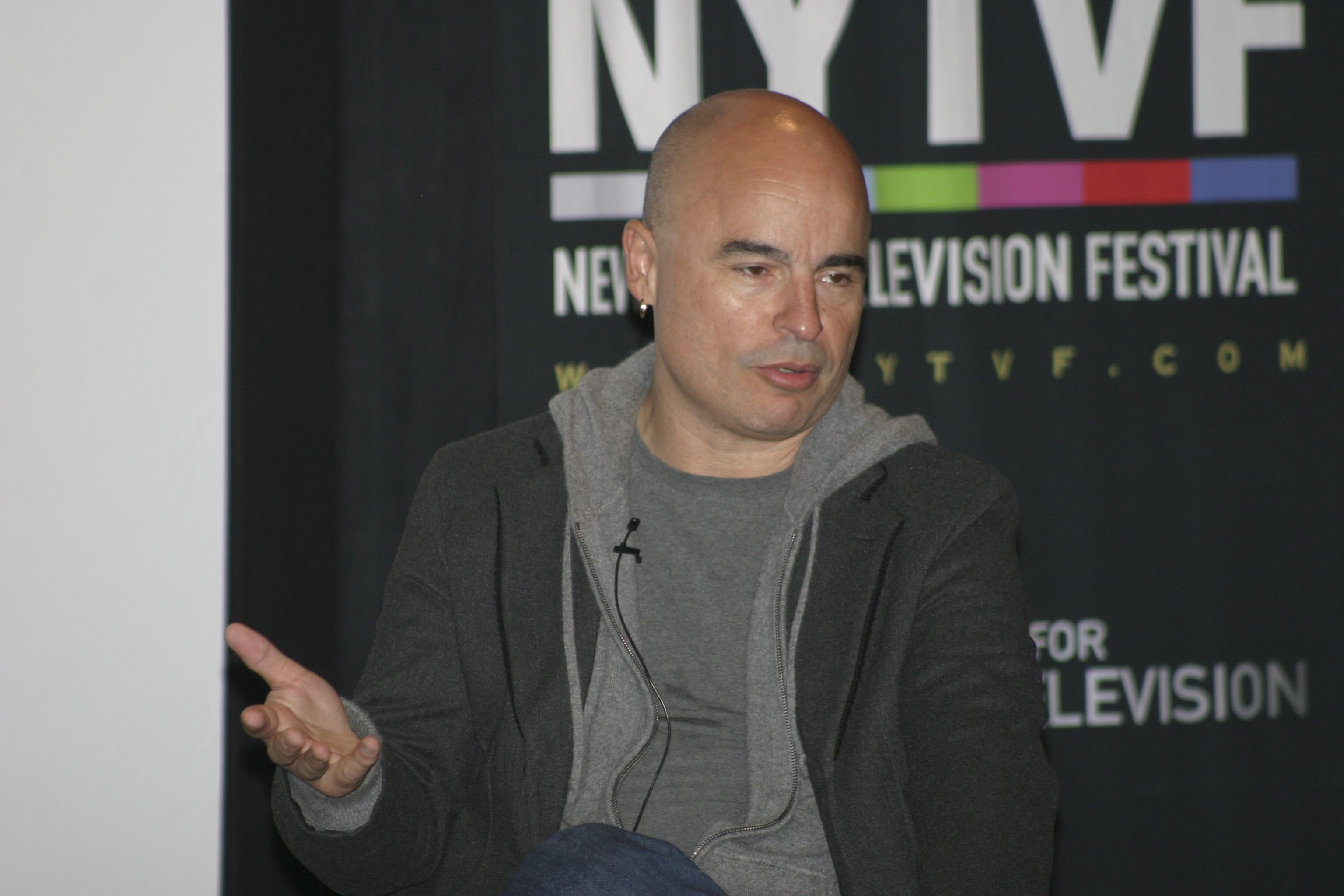 © Rubenstein, photographer Martyna Borkowski